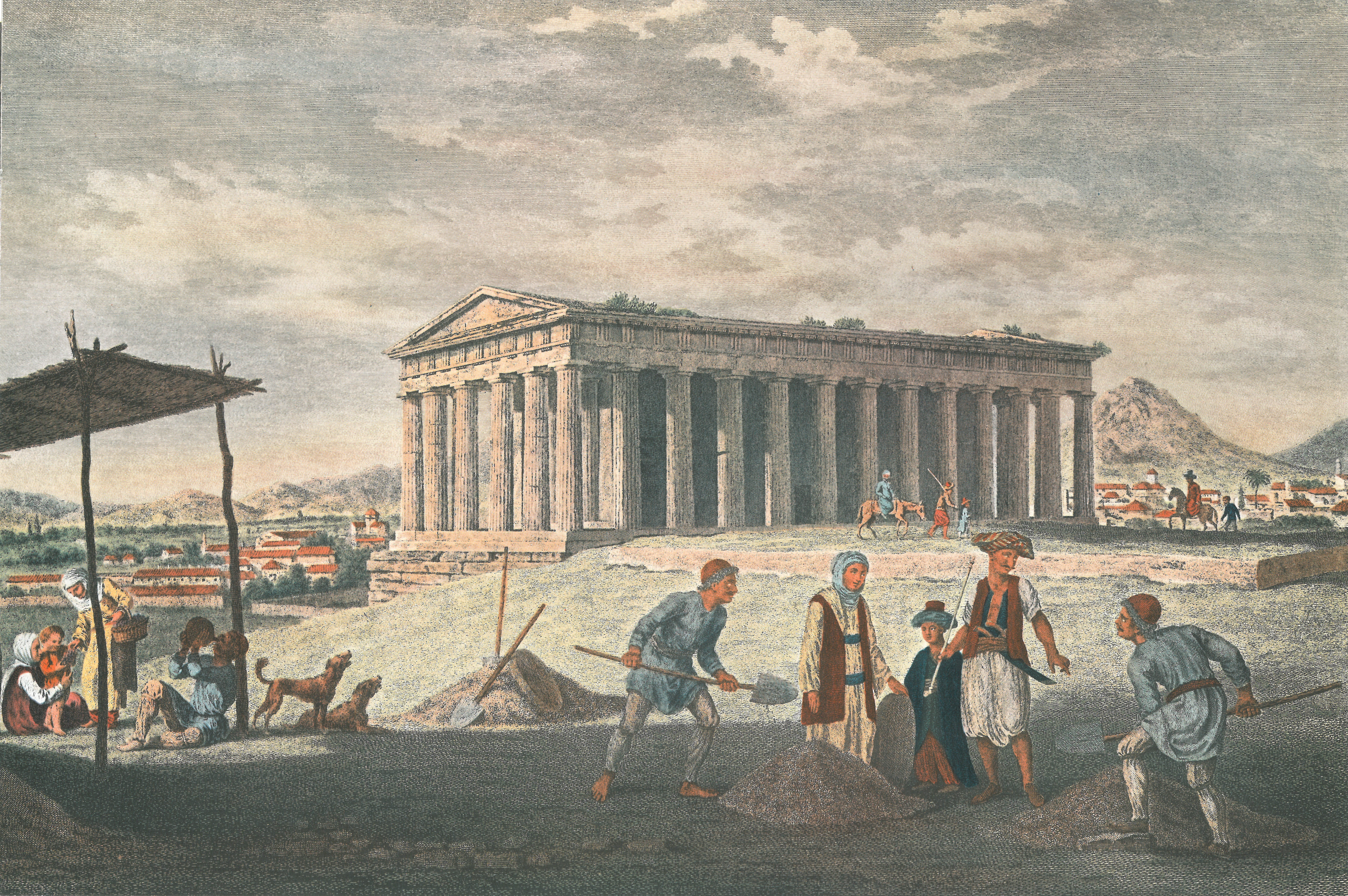 Храм Гефеста в Афінах, Джеймс «Афінянин» Стюарт